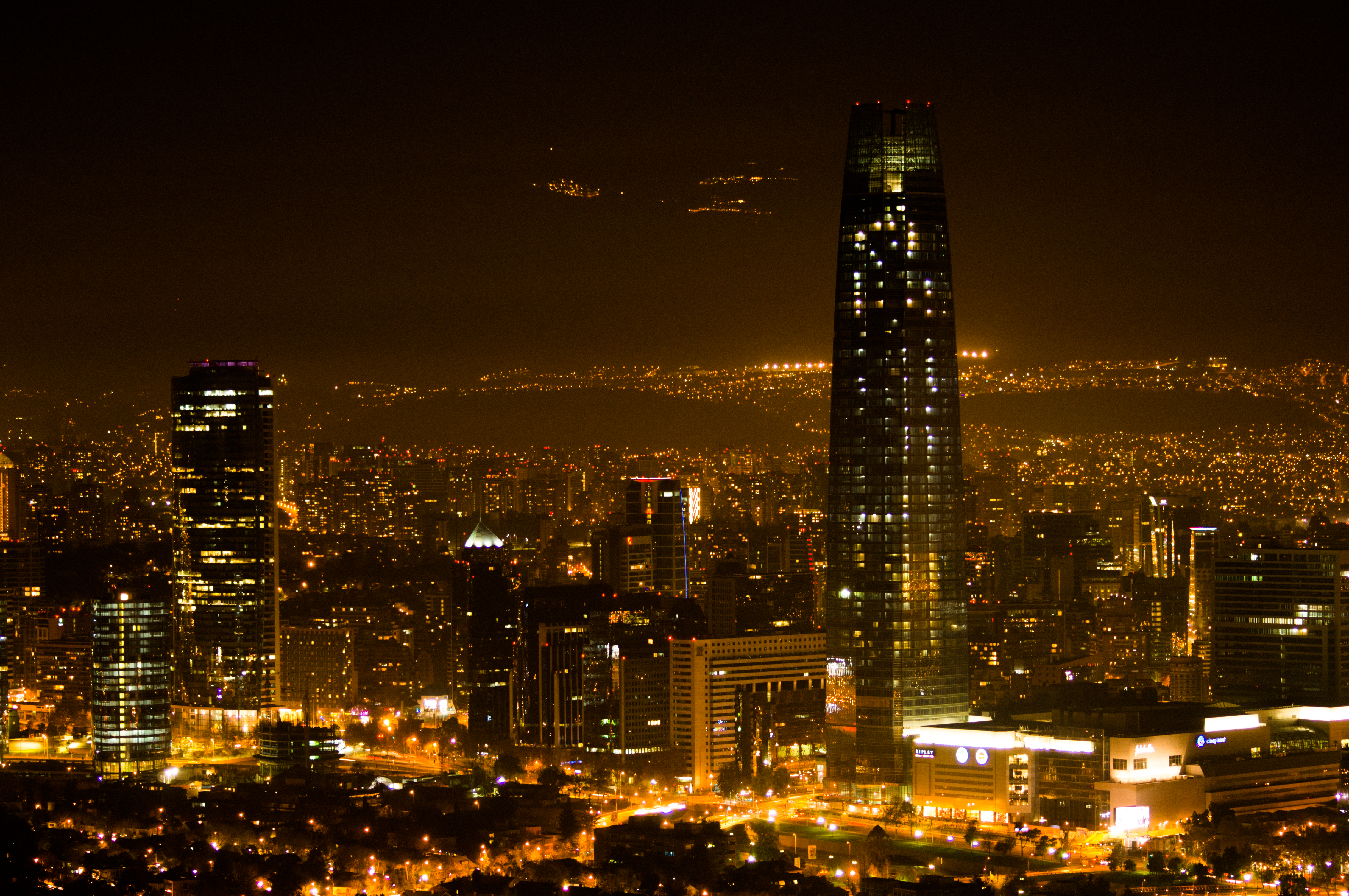 se ve principalmente la torre santiago, y la torre titanium, Sanhattan